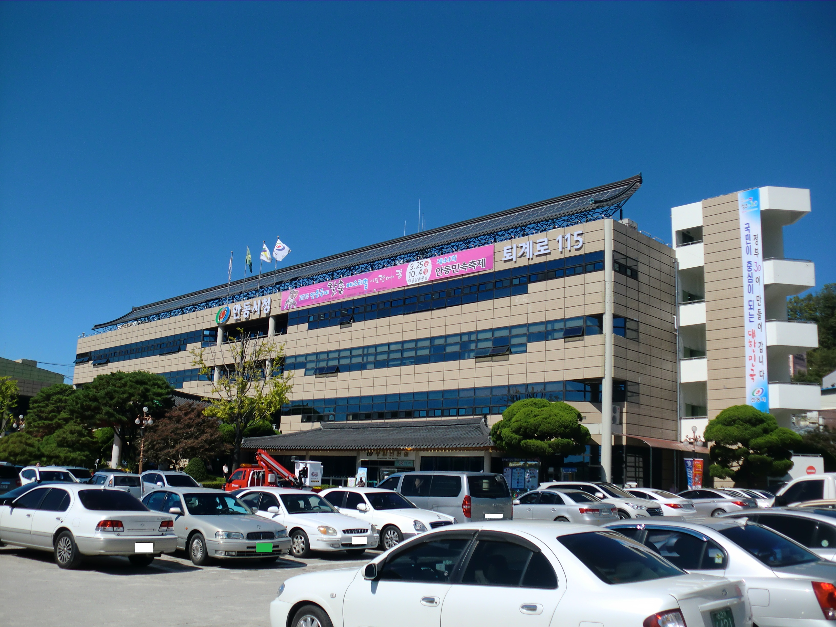 경상북도 안동시에 있는 안동시청